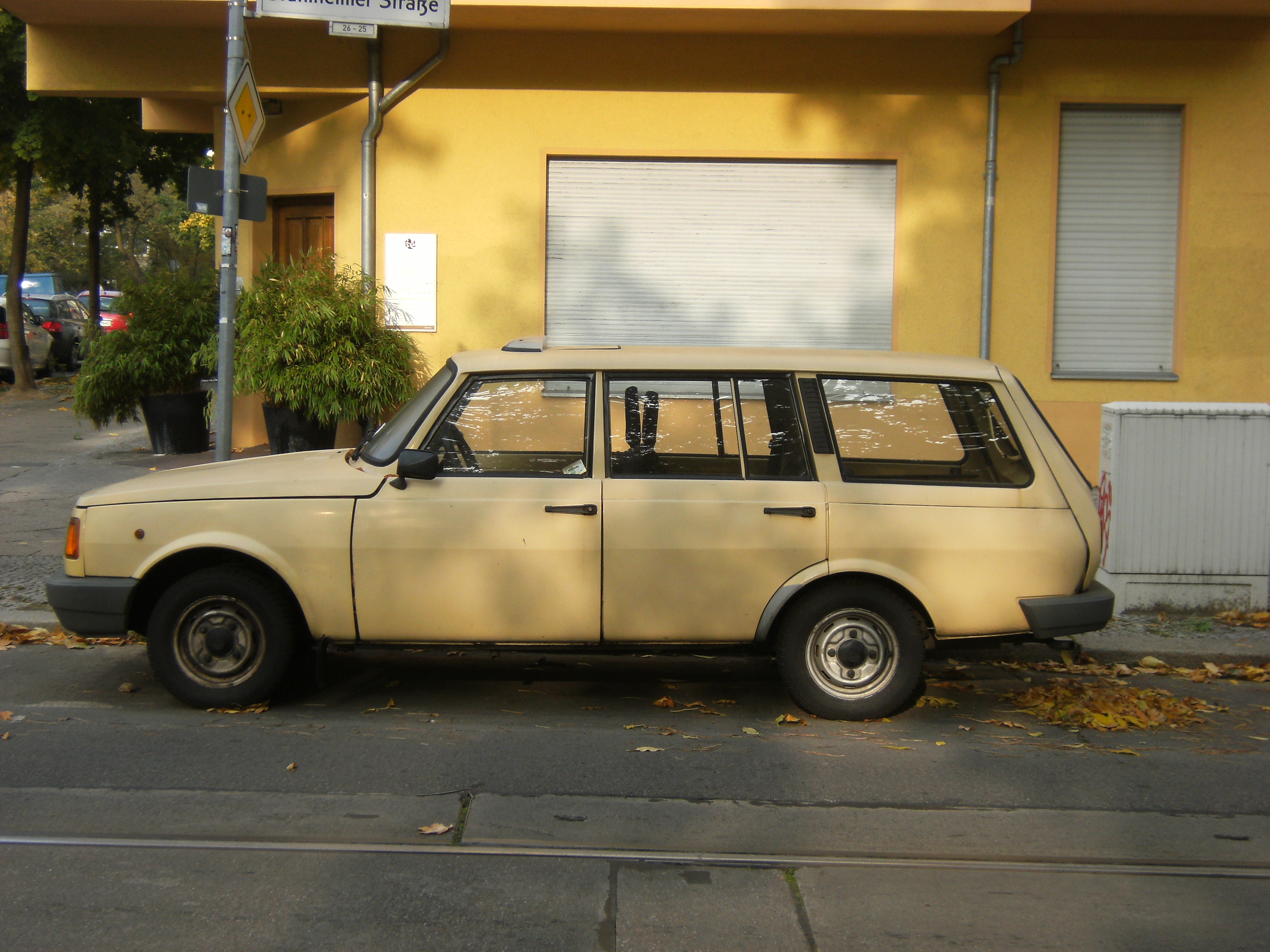 Wartburg in Pankow 2008